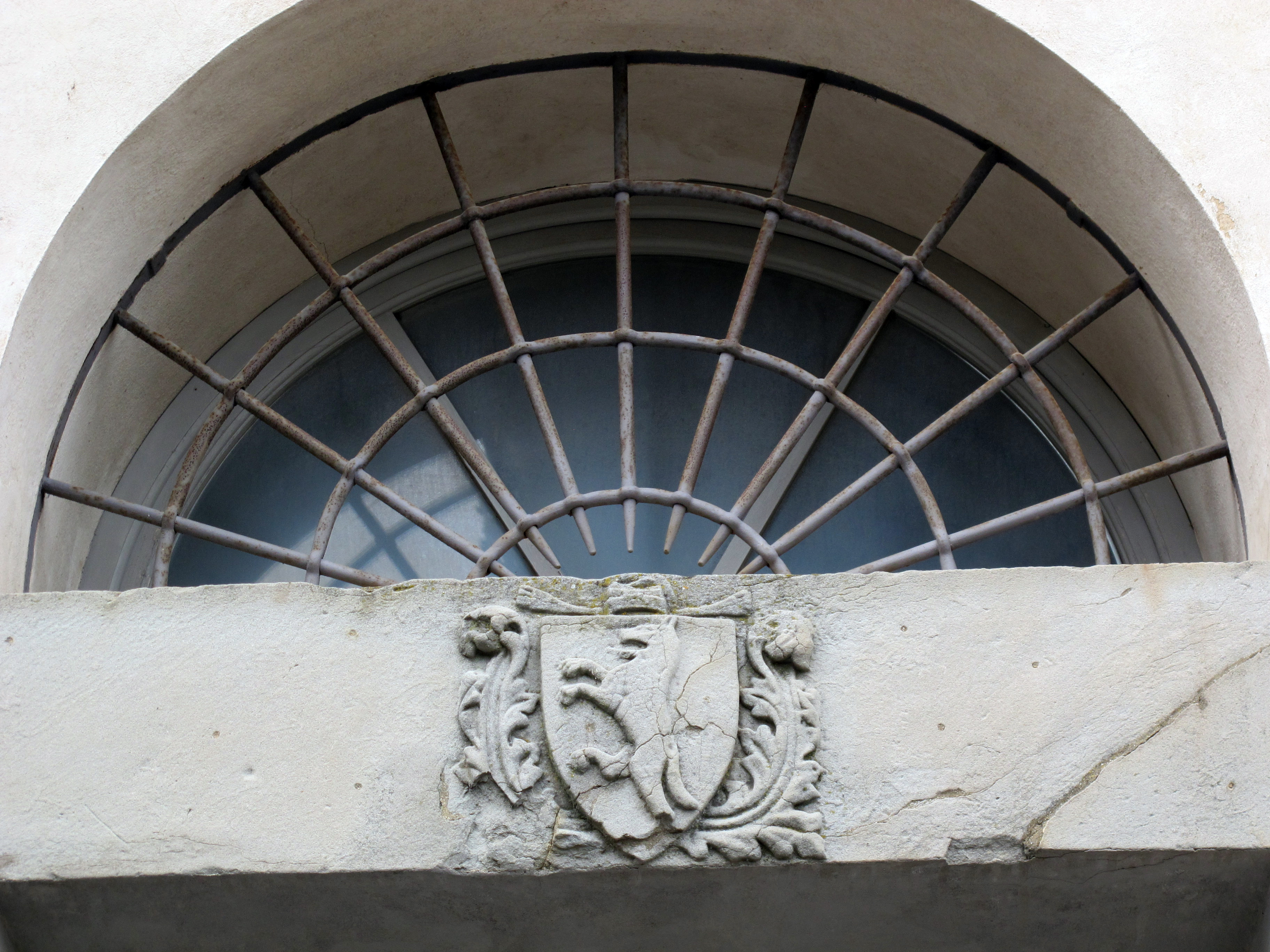 Fiesole, cappella di san jacopo, ingresso 02 stemma altoviti